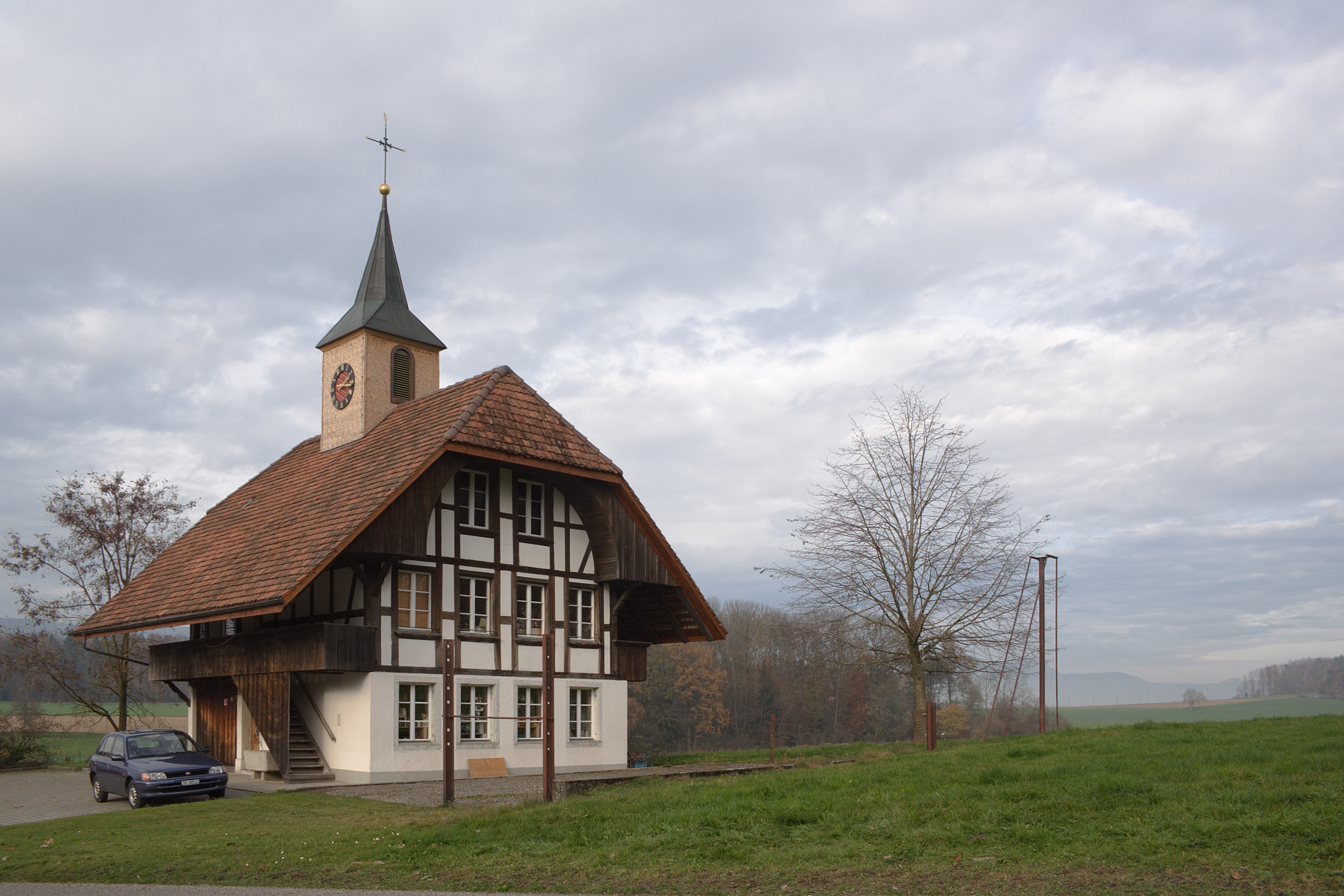 Das alte Schulhaus in Gächliwil, SchweizHeute genutzt als Krämerladen.